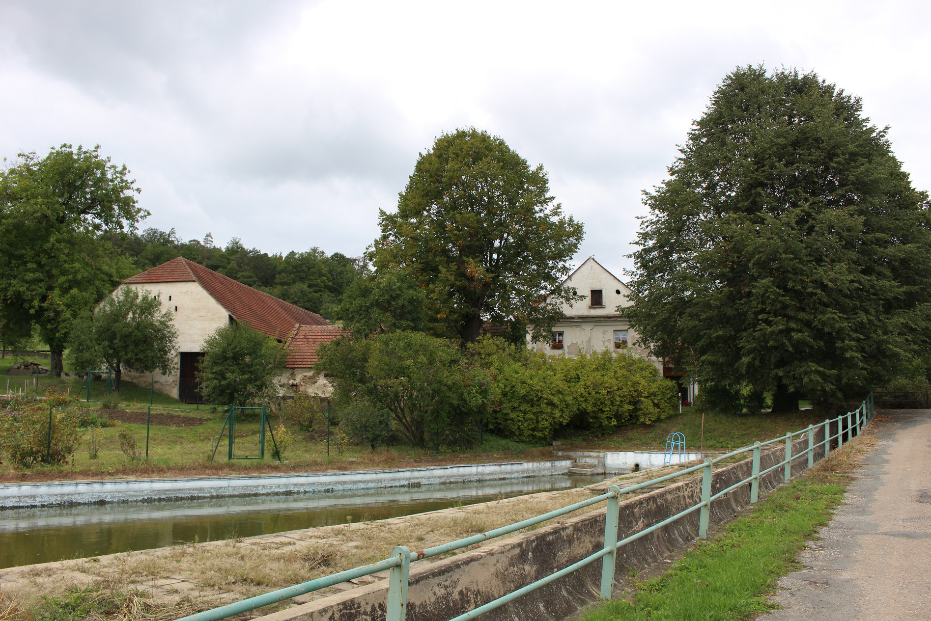 obec Pejškov, část města Tišnov, okres Brno-venkov, střed obce s koupalištěm